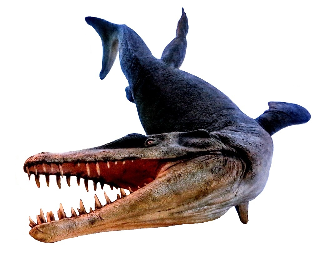 Dakosaurus restoration at Museum am Löwentor, Stuttgart (Germany)